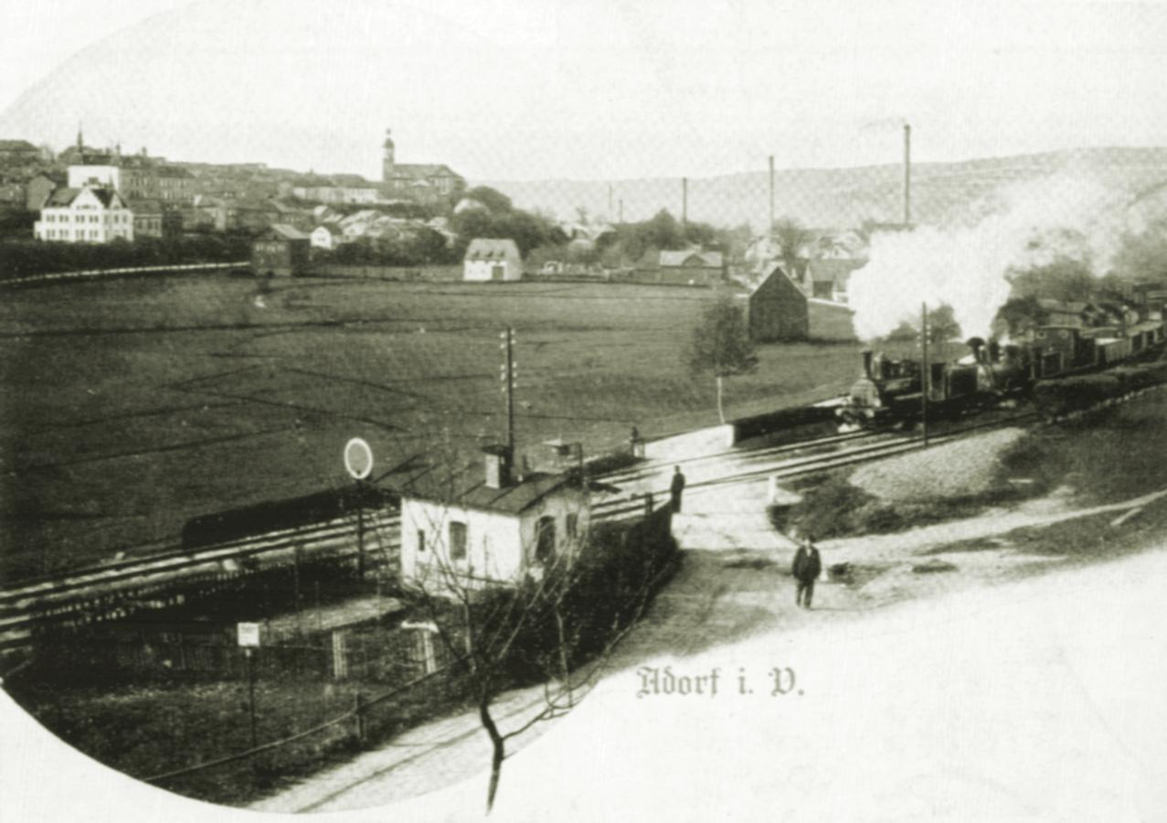 Bahnübergang bei Jugelsburg an der Bahnstrecke Plauen–Eger (Zuglok: Gatting VII, Vorspann: Gattung IIIb)